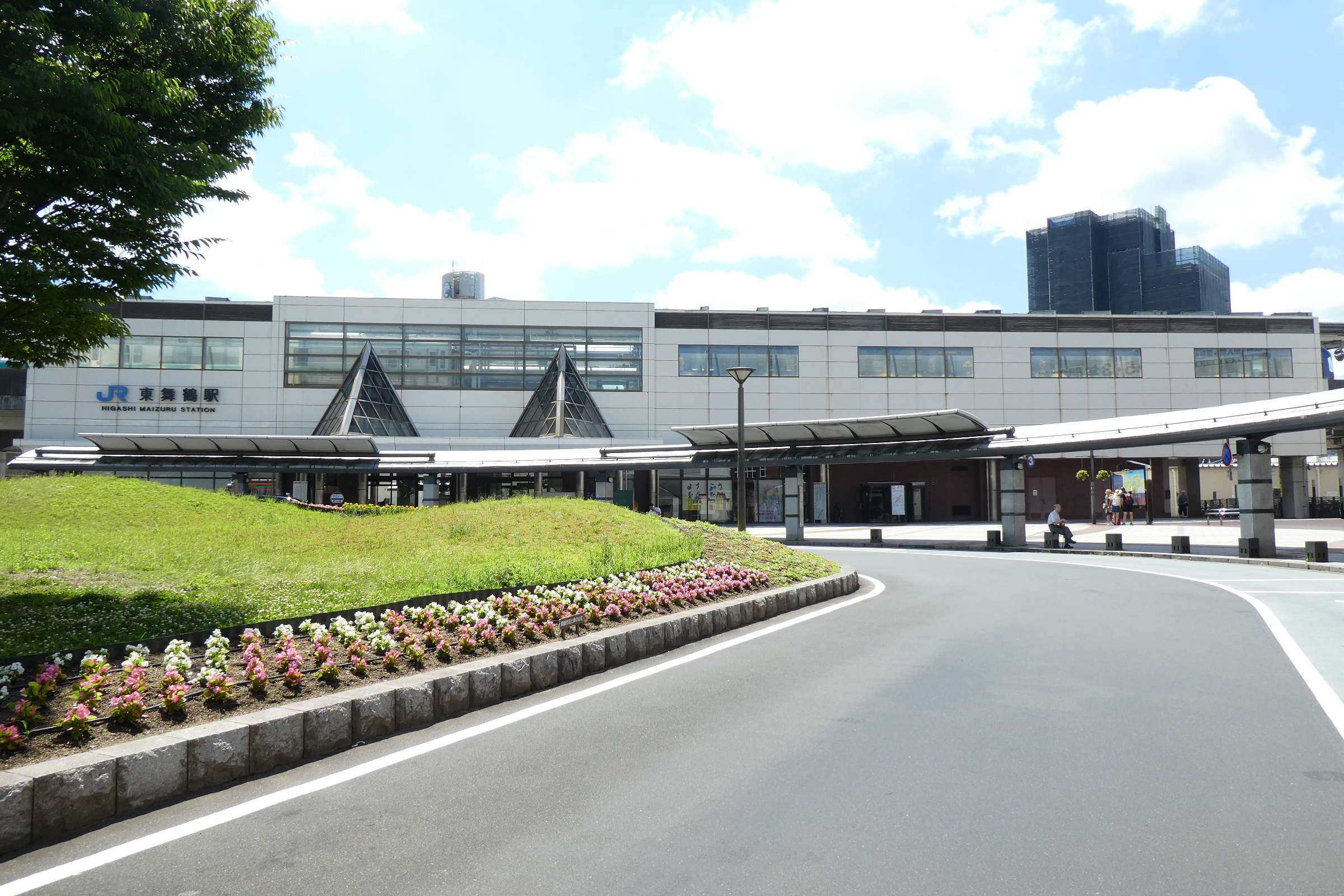 JR西日本 東舞鶴駅 北口。